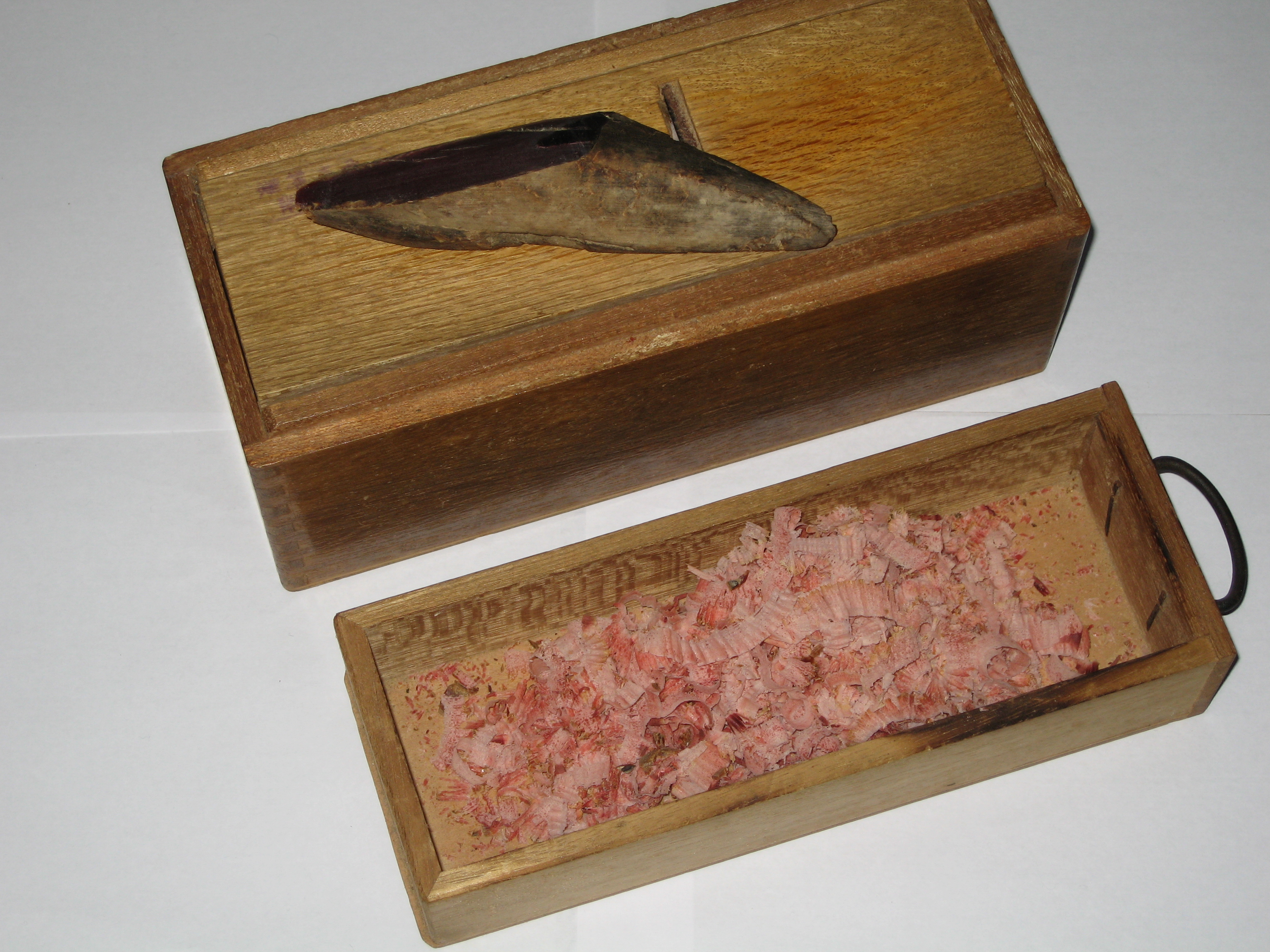 鰹節と削り器